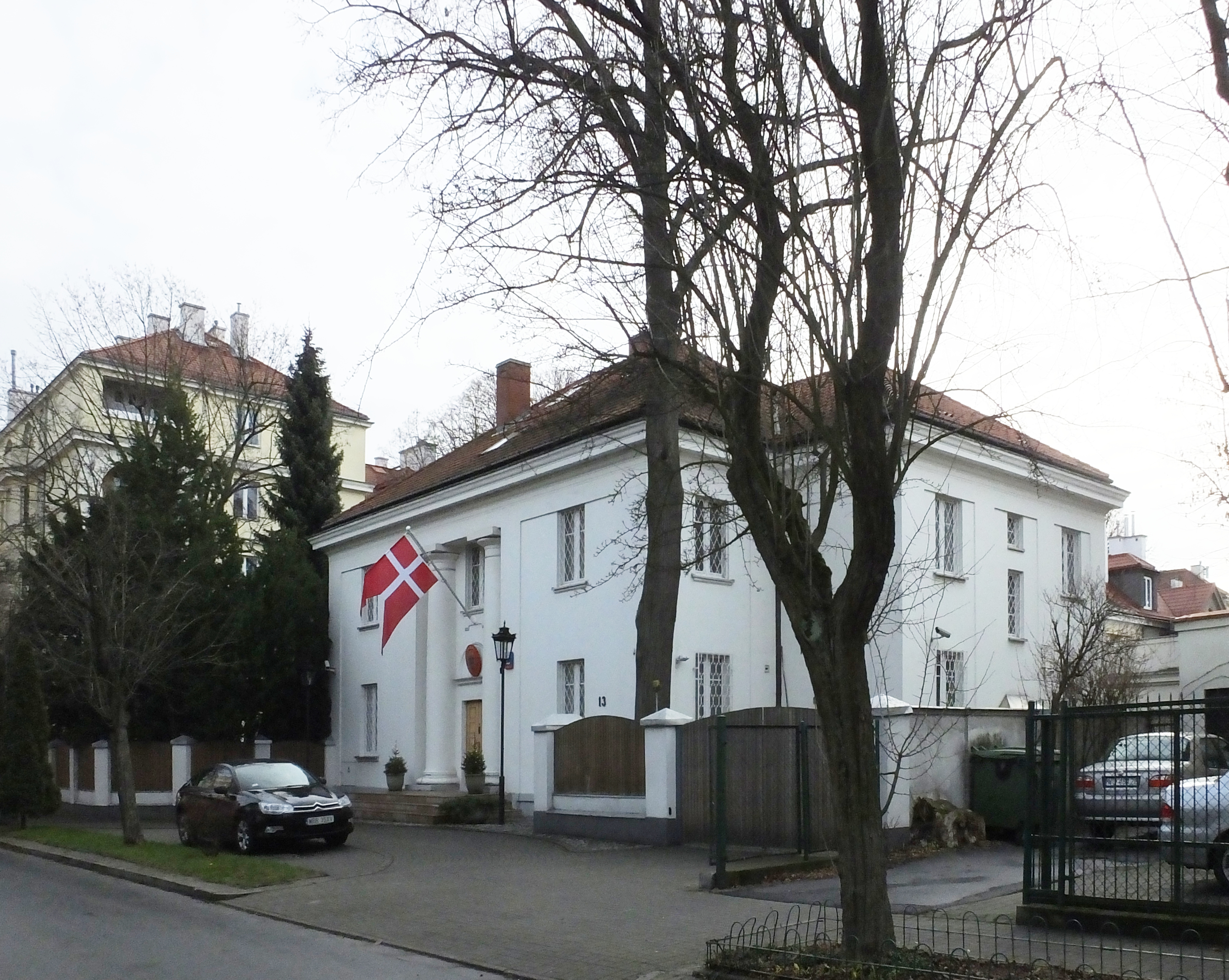 Kolonia Staszica w Warszawie